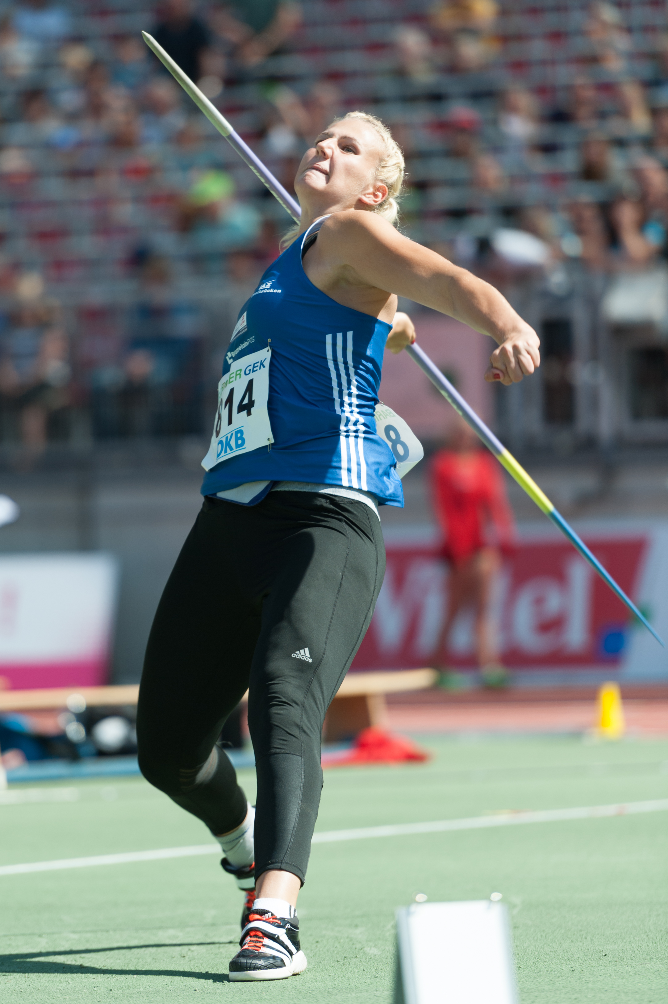 Deutsche Leichtathletik-Meisterschaften 2015: Frauen Speerwurf - Christin Hussong, LAZ Zweibrücken